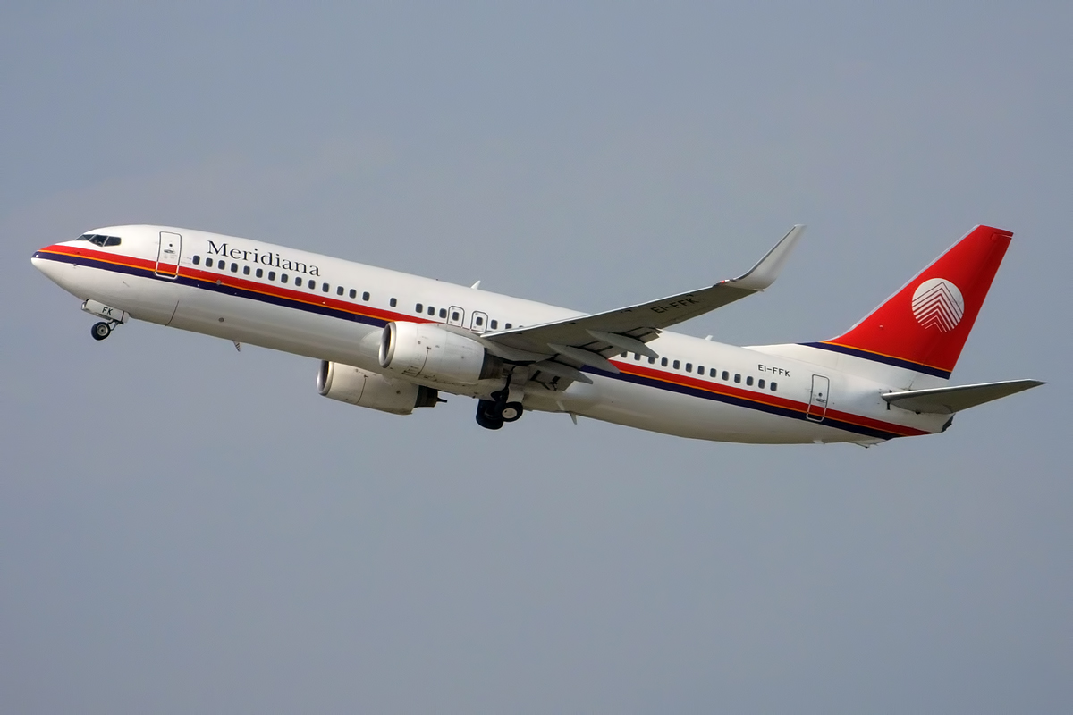 Meridiana, EI-FFK, Boeing 737-81Q